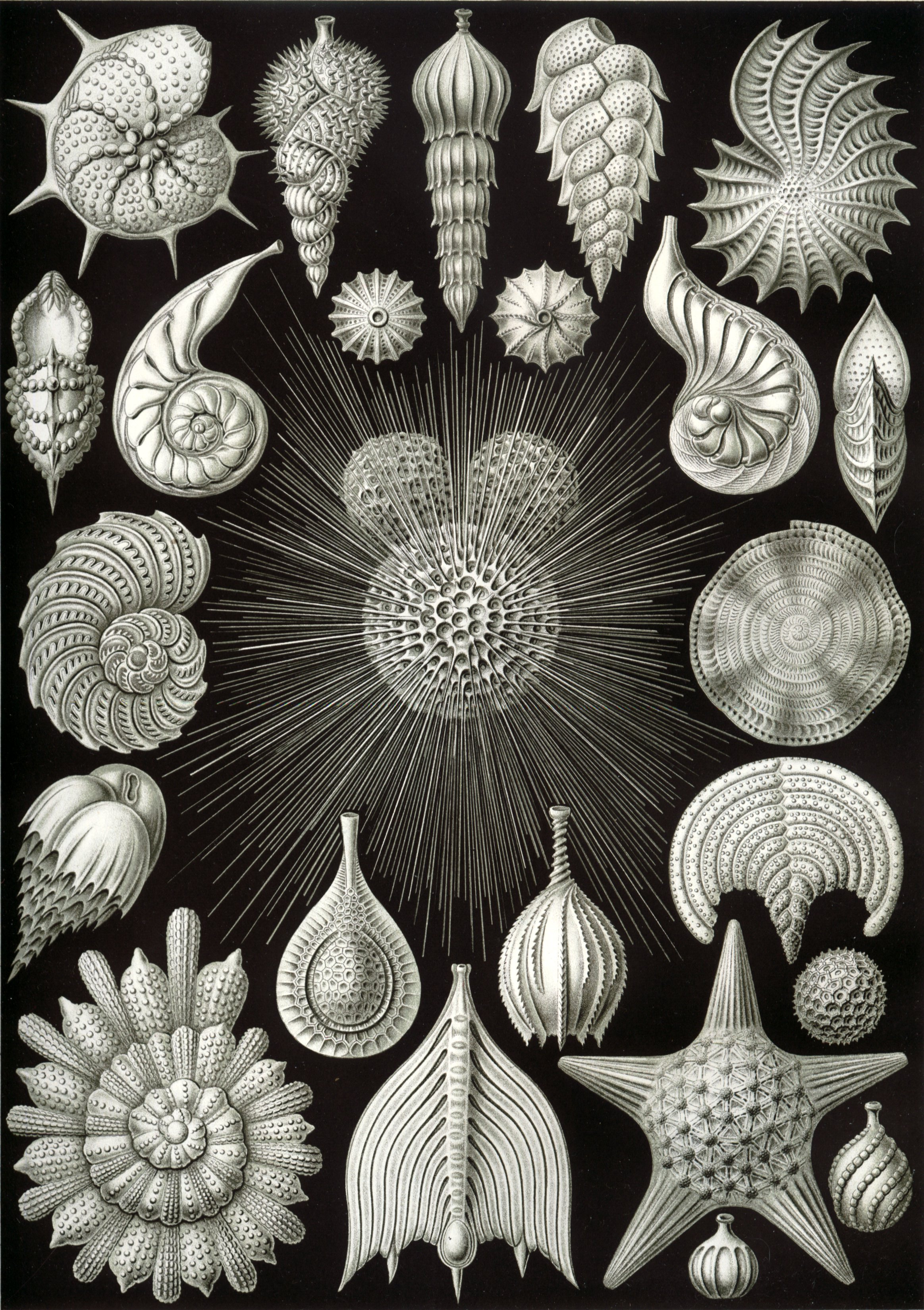 Nodosaria spinicosta (d'Orbigny) = Laevidentalina badenensis (d'Orbigny, 1846)[1], side view (1a: top view) Uvigerina aculeata (d'Orbigny) = Uvigerina aculeata (d'Orbigny, 1846)[2] Bolivina alata (Seguenza) = Bolivina alata (Seguenza, 1862)[3] Cristellaria echinata (d'Orbigny) = Spincterules anaglyptus (Loeblich & Tappan, 1988)[4], side view (4a: top view) Cristellaria siddalliana (Brady) = Planularia siddalliana (Brady, 1881)[5] Cristellaria compressa (d'Orbigny) = Lenticulina compressa (d'Orbigny, 1846)[6] Polystomella aculeata (d'Orbigny) = Elphidium aculeatum (d'Orbigny, 1846)[7], side view (7a: top view) Polystomella venusta (Max Schultze) = Polystomella venusta Schultze, 1854[8] Nummulites orbiculatus (Ehrenberg) = Nummulites orbiculatus Schafhäutl 1863[9] Globigerina bulloides (d'Orbigny) = Globigerina bulloides d'Orbigny, 1826[10] Pavonina flabelliformis (d'Orbigny) = Pavonina flabelliformis d'Orbigny, 1826[11] Bulimina inflata (Seguenza) = Bulimina inflata Seguenza, 1862[12] Frondicularia alata (d'Orbigny) = Frondicularia complanata Defrance in Blainville, 1824[13] Calcarina clavigera (d'Orbigny) = Calcarina sp.? Tinoporus baculatus (Carpenter) = Tinoporus baculatus Montfort Em. Carpenter, 1861[14] Orbulina universa (d'Orbigny) = Orbulina universa d'Orbigny, 1839[15] Lagena alata (Brady) = Parafissurina lateralis f. alata Buchner, 1940[16] Lagena interrupta (Williamson) = Lagena interrupta Williamson, 1848[17], side view (18a: top view) Lagena acuticosta (Reuss) = Lagena acuticosta (Reuss, 1862)[18] Lagena spiralis (Brady) = Cushmanina spiralis Brady, 1884[19]